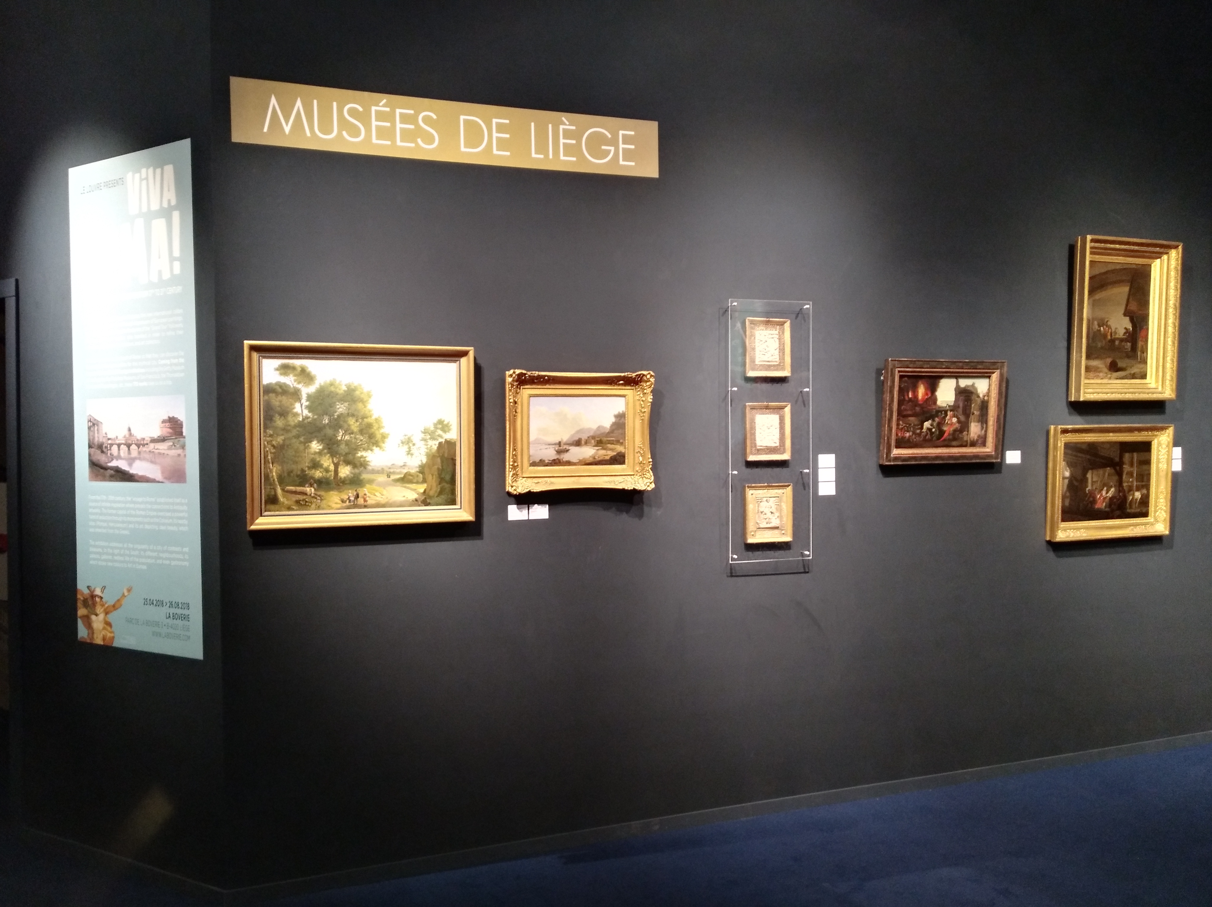 Les musées de Liège au stand Chapeau! de la TEFAF